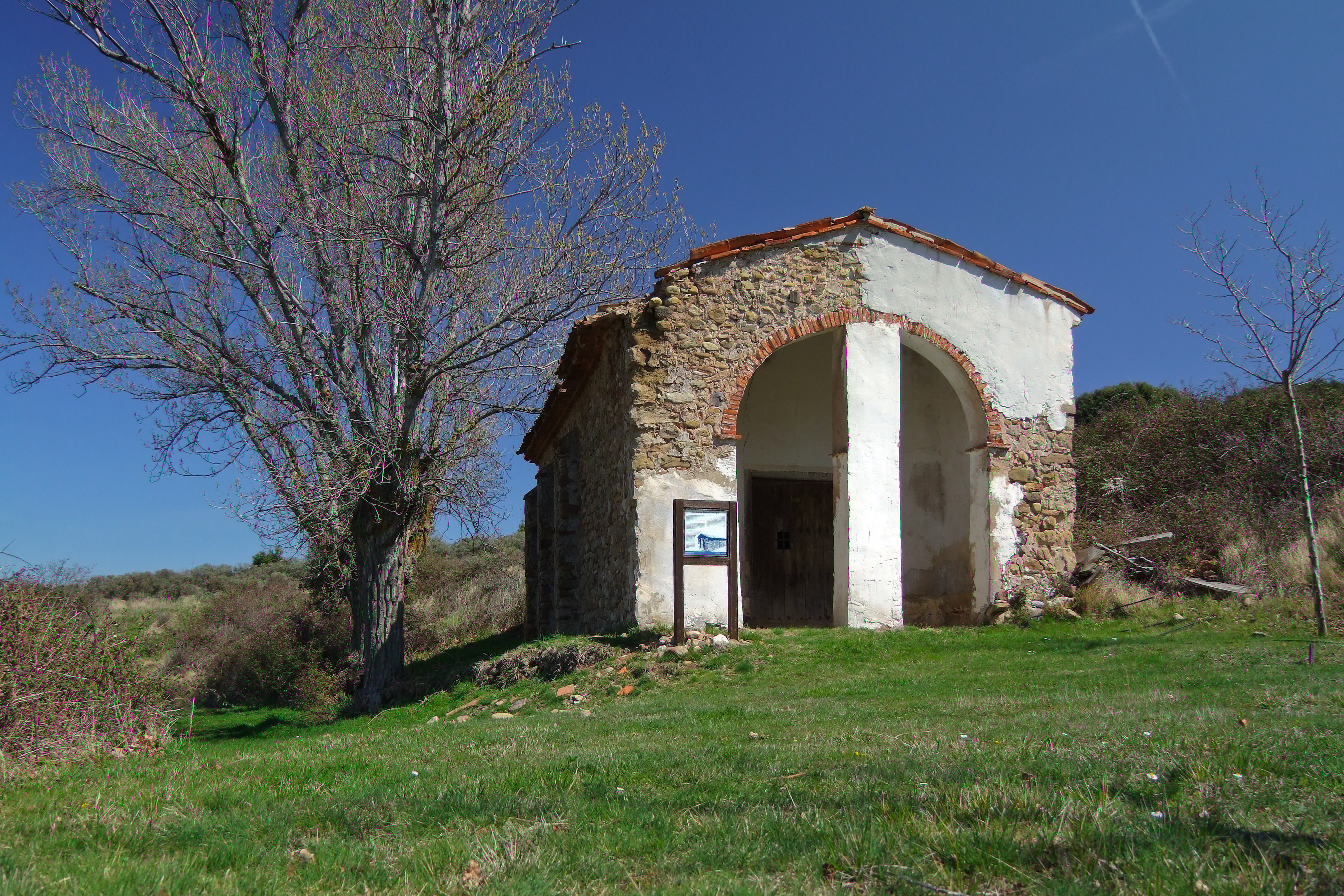 Ermita de Santo Domingo de Silos en la localidad de La Villa de Ocón, La Rioja - España